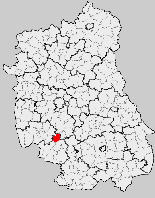 Map of gmina Batorz, Janów Lubelski county, Lublin voivodship Mapa gminy Batorz, powiat janowski, województwo lubelskie